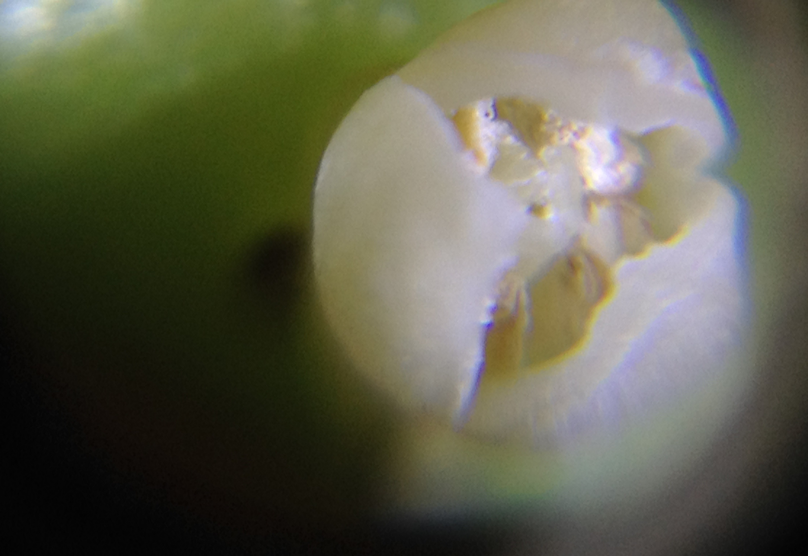 Une fleur du C. microspadix